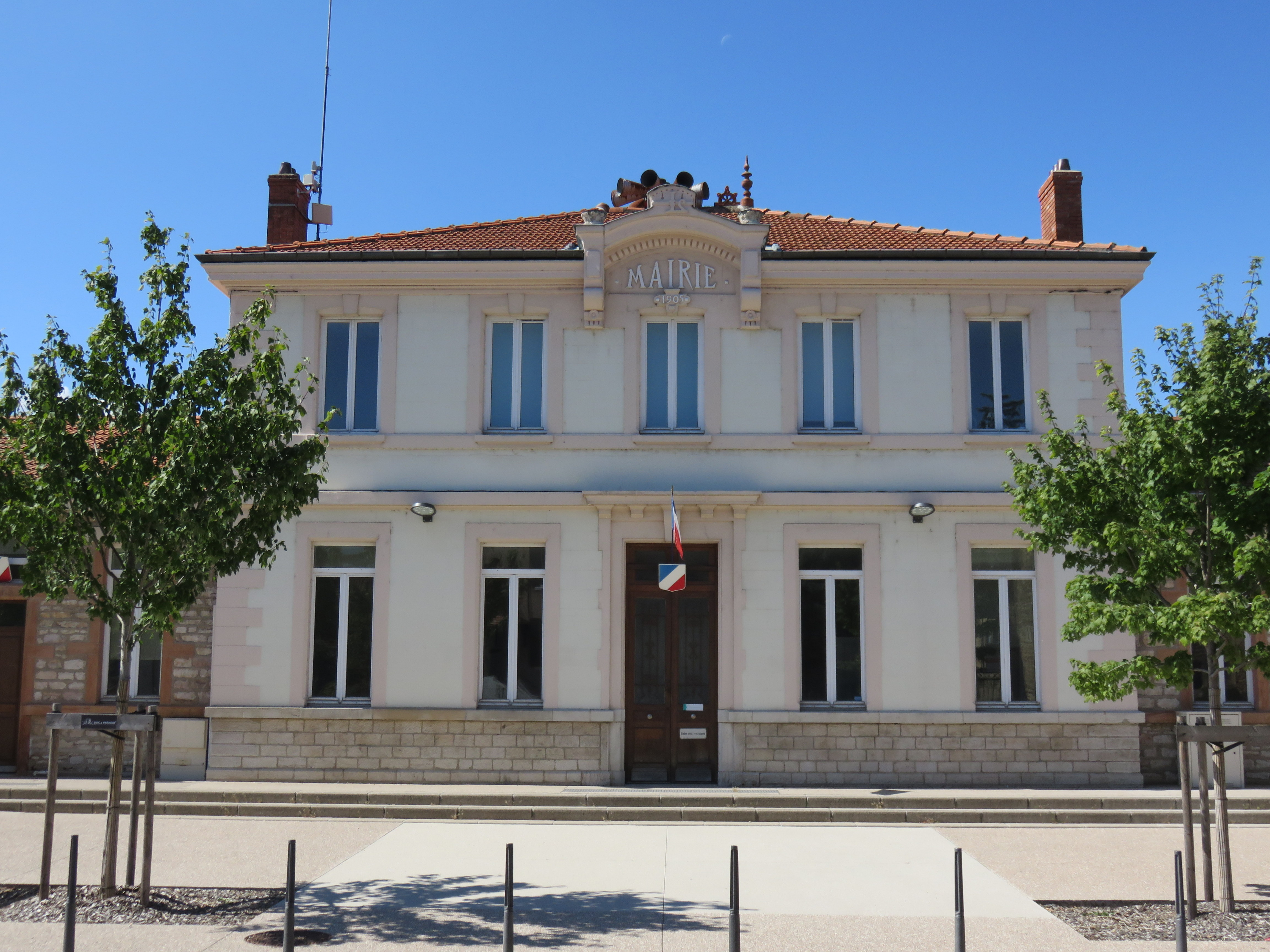 Mairie de Lissieu (Rhône, France).